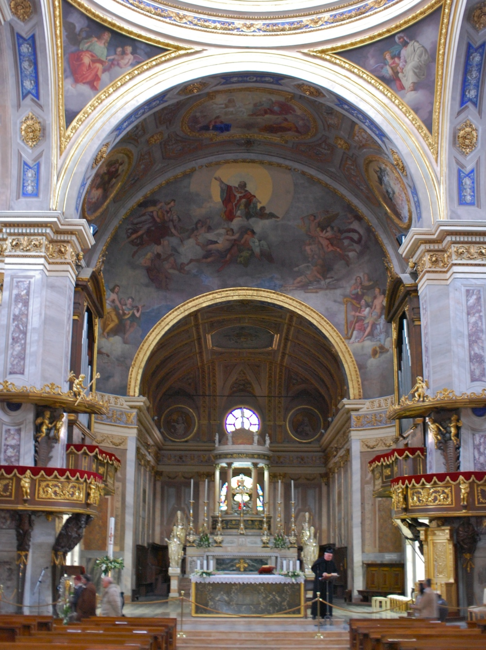 Altare dell'abside del duomo di Vigevano